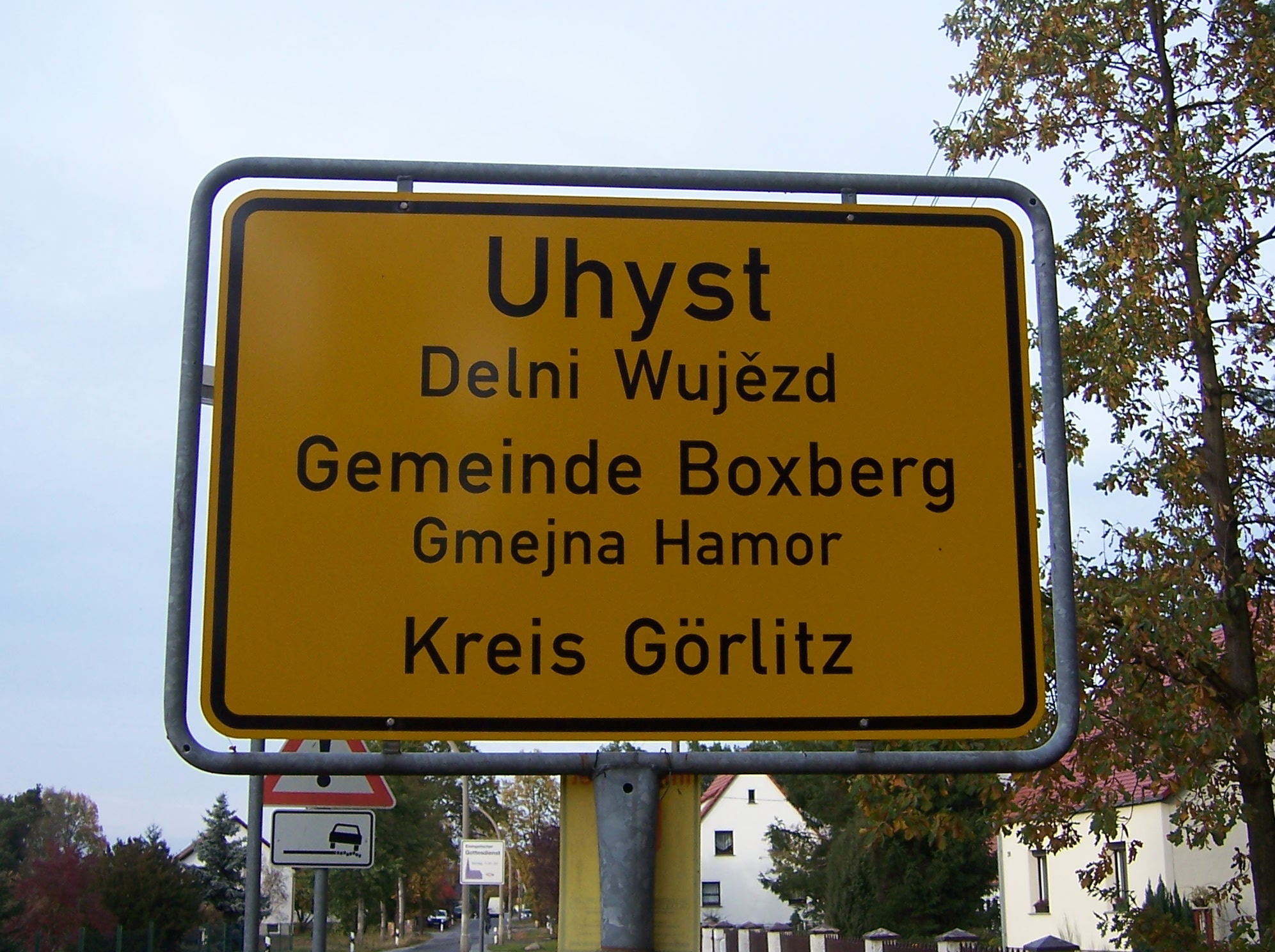 Ortstafel von Uhyst (Spree) Hornjoserbsce: Wjesna tafla Delnjeho Wujězda